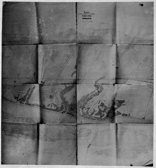 Беларуская (тарашкевіца): Мазыр (Mazyr). Плян места